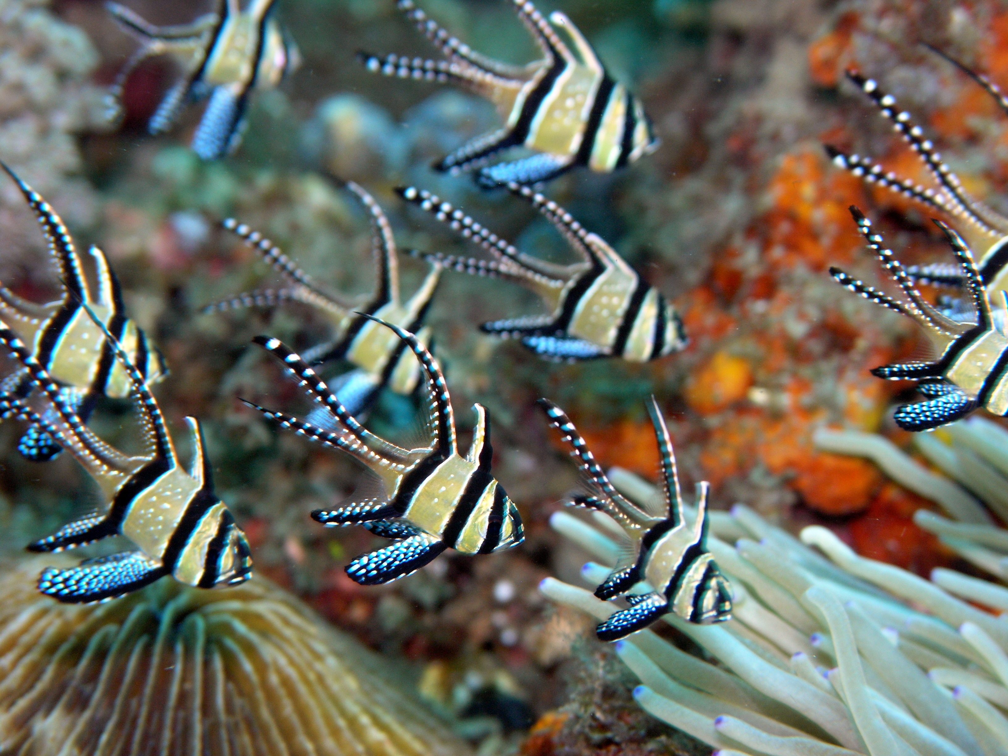 Image of a Banggai cardinalfish. Pterapogon kauderni. Taken at Lembeh Straits, North Sulawesi, Indonesia.